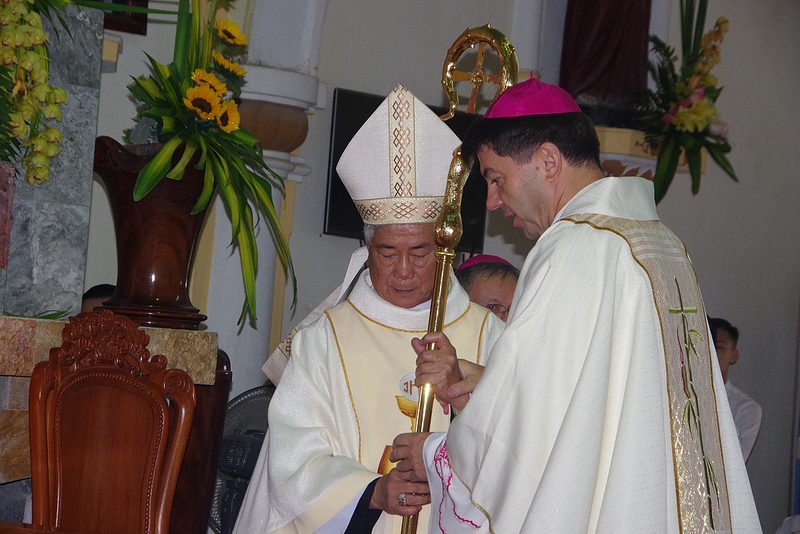 Đại diện Tòa Thánh Marek Zalewski trao Gậy mục tử cho Tân GM. Giáo phận Vinh Anphong Nguyễn Hữu Long